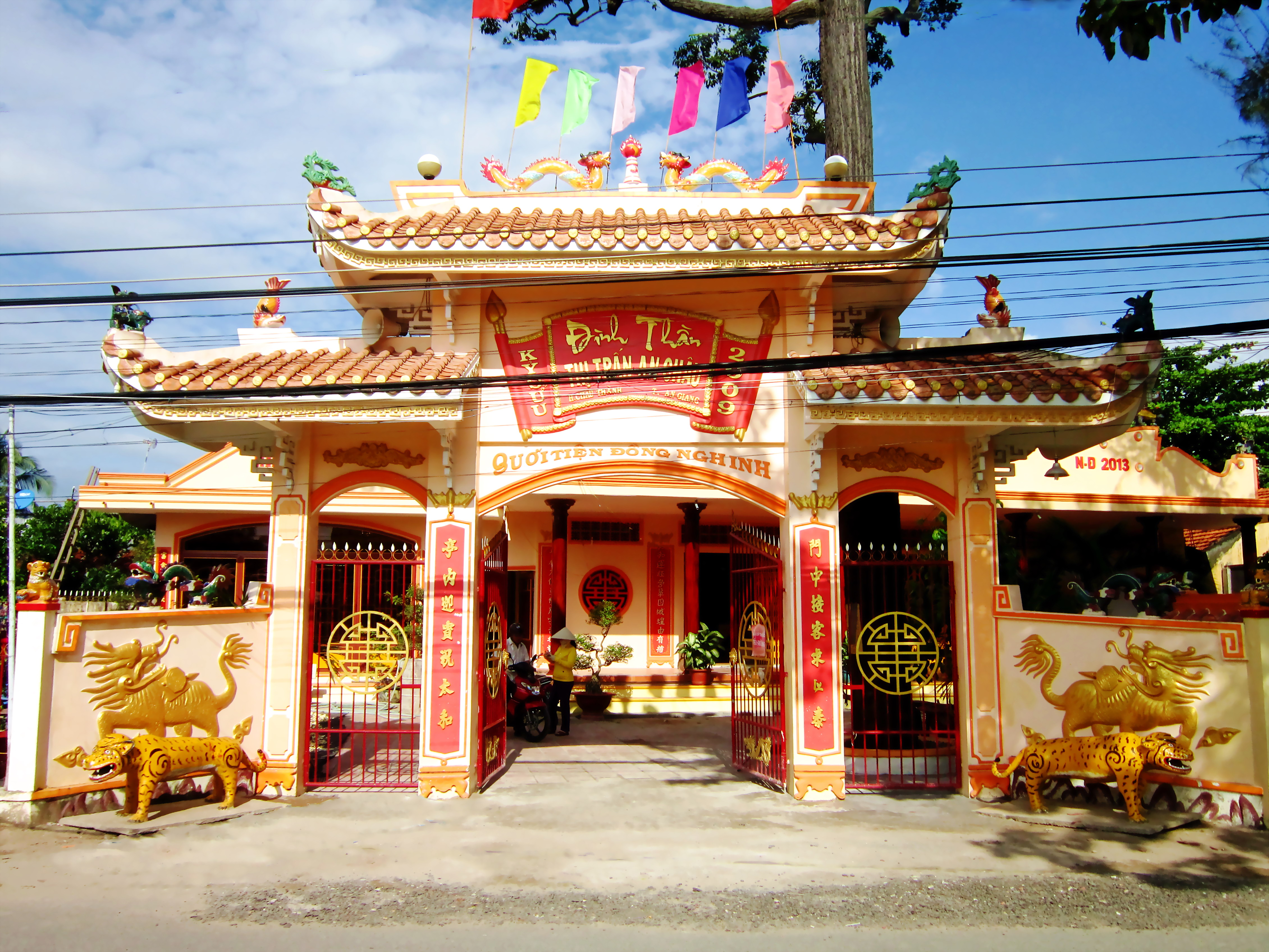 Đình thần An Châu ở thị trấn An Châu, thuộc huyện Châu Thành, tỉnh An Giang, Việt Nam